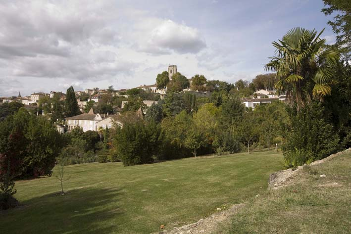 La ville de Lectoure (Gers, France) et le clocher de la cathédrale Saint-Gervais et Saint-Protais.